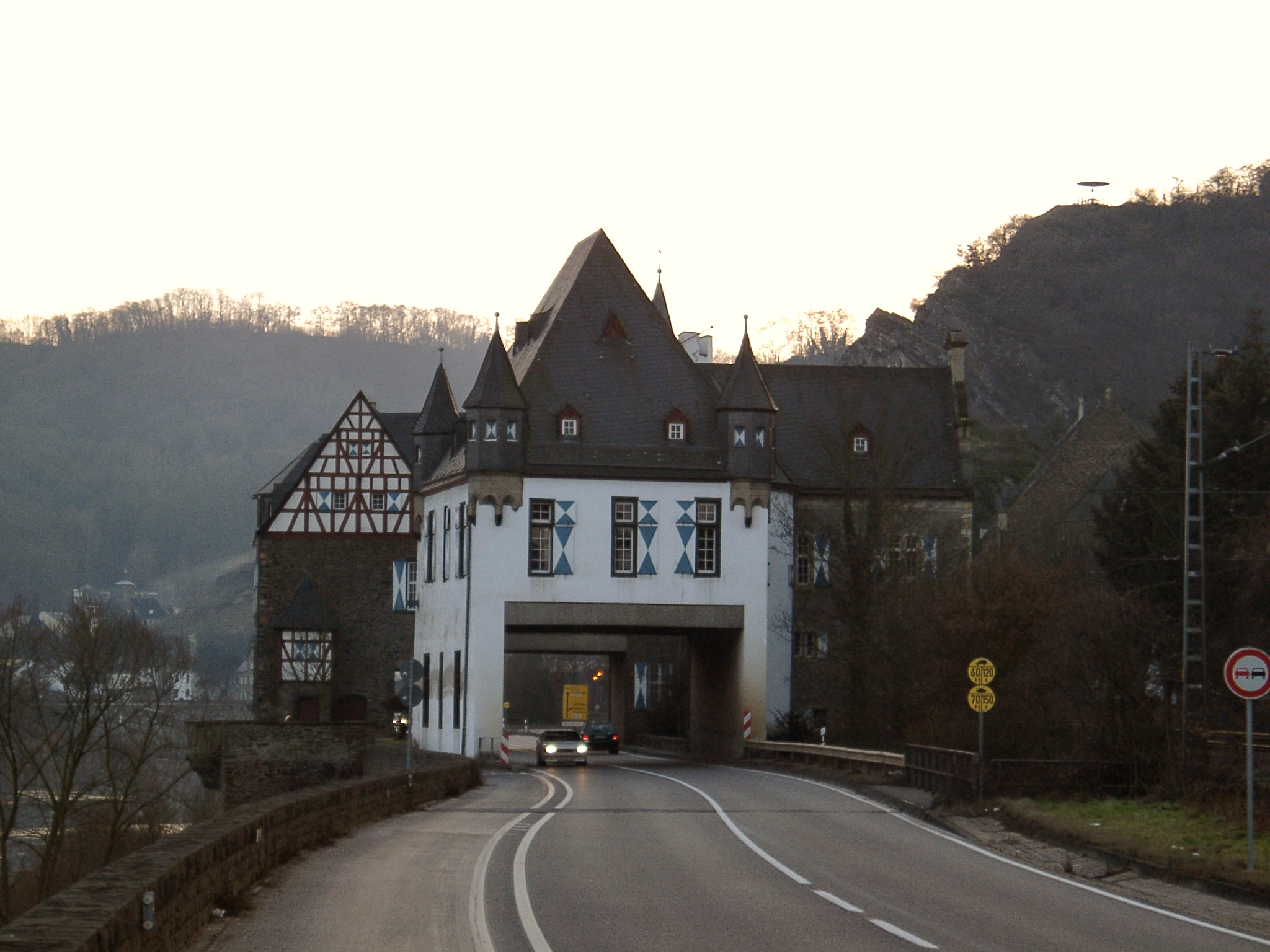 Schloss in Gondorf (Mosel) mit Strassendurchbruch